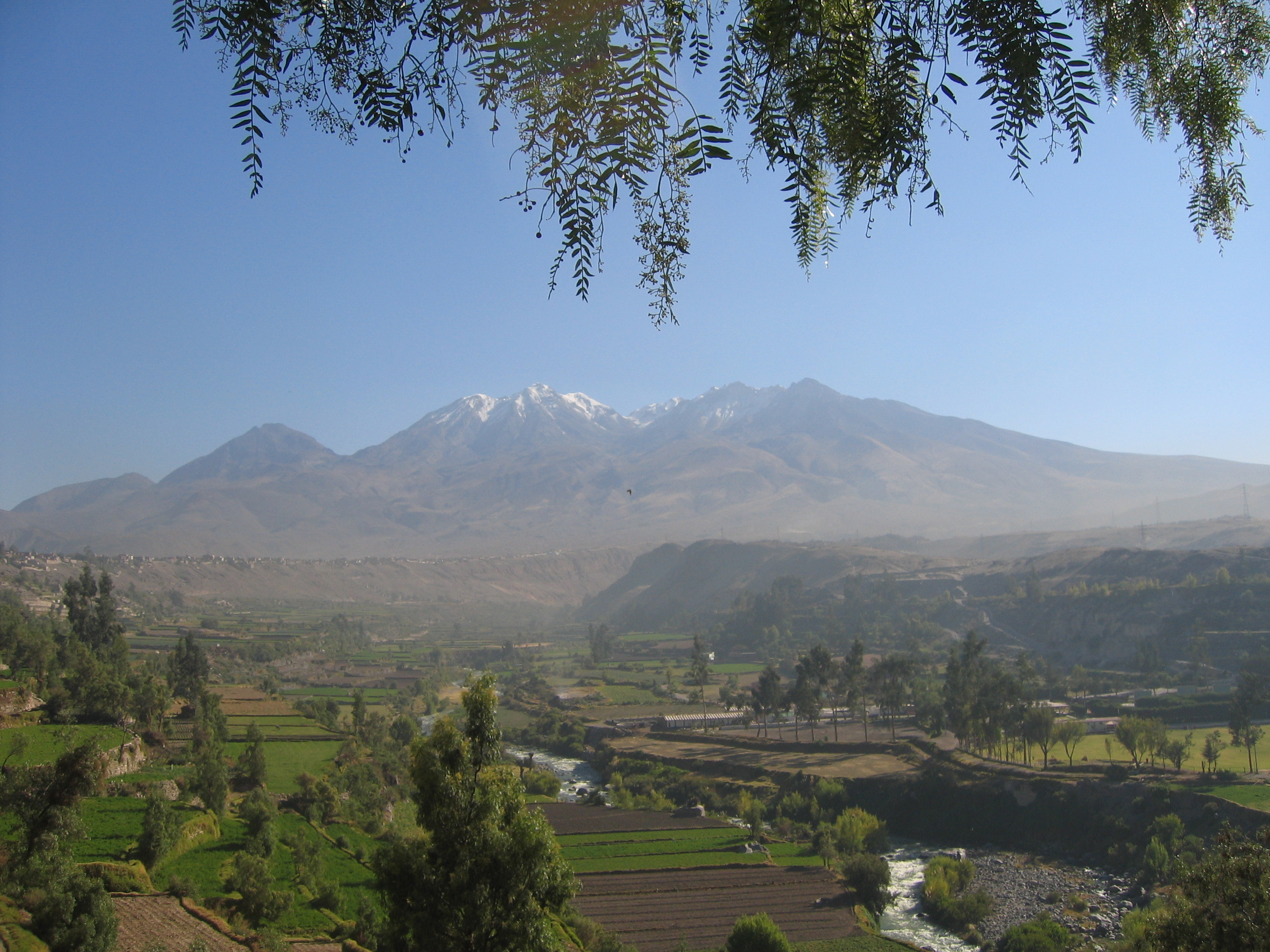 Arequipa (Peru), August 2007